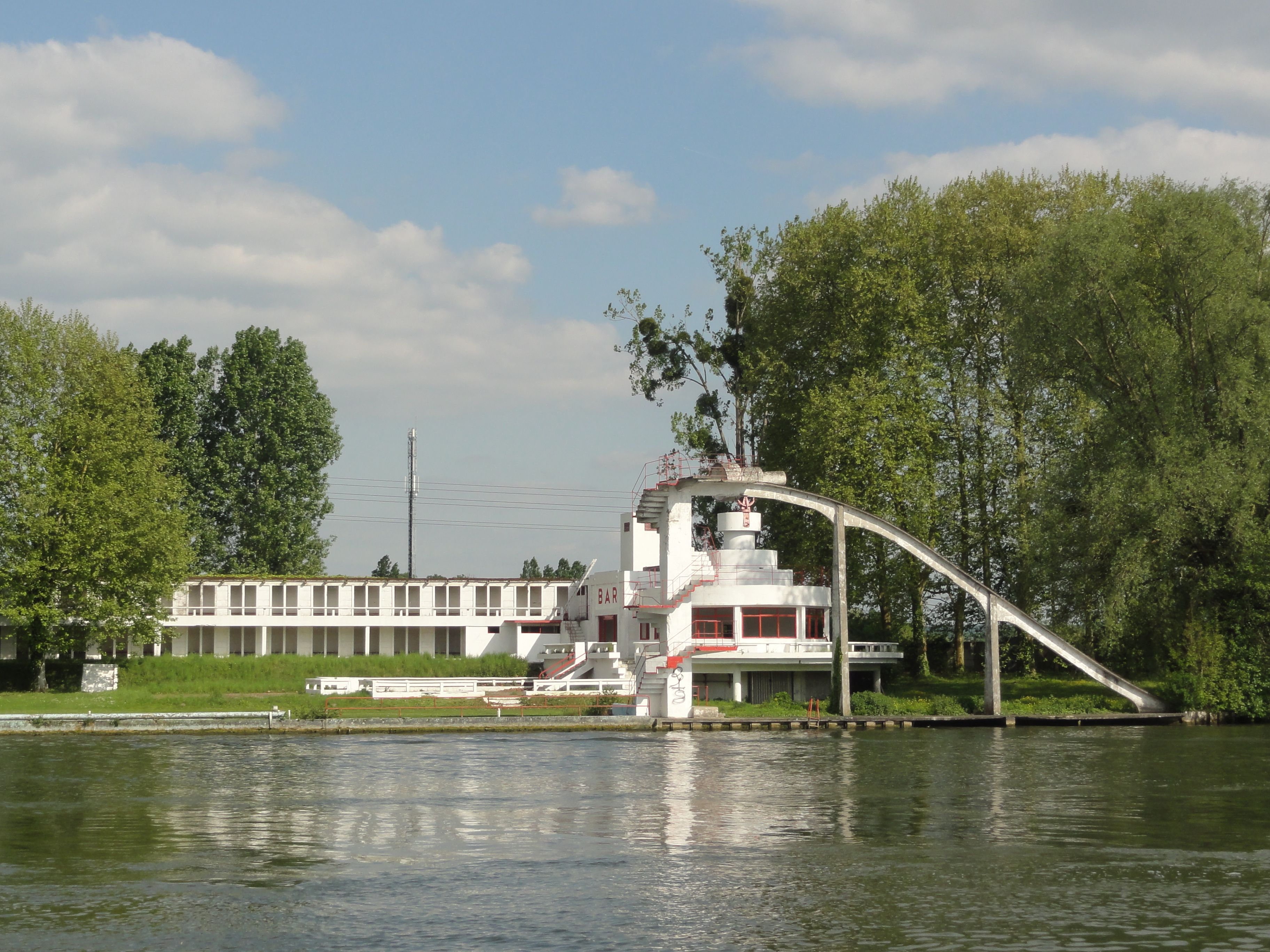 L'ancienne plage fluviale en 2014.